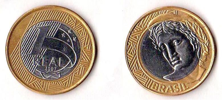 Moneda de 1 real brasileño de 2007.